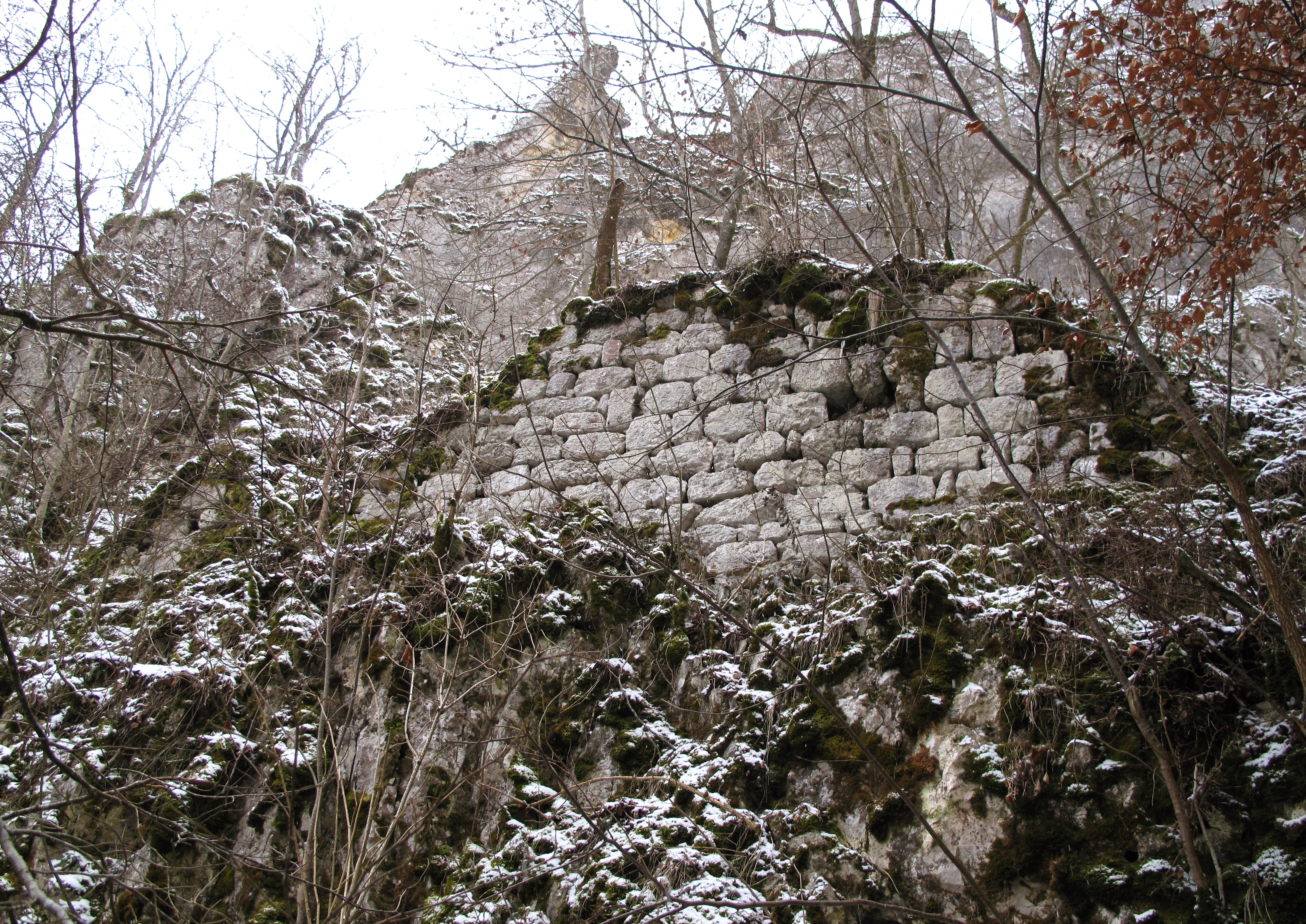 Große Umfassungsmauerreste der unteren Burg.